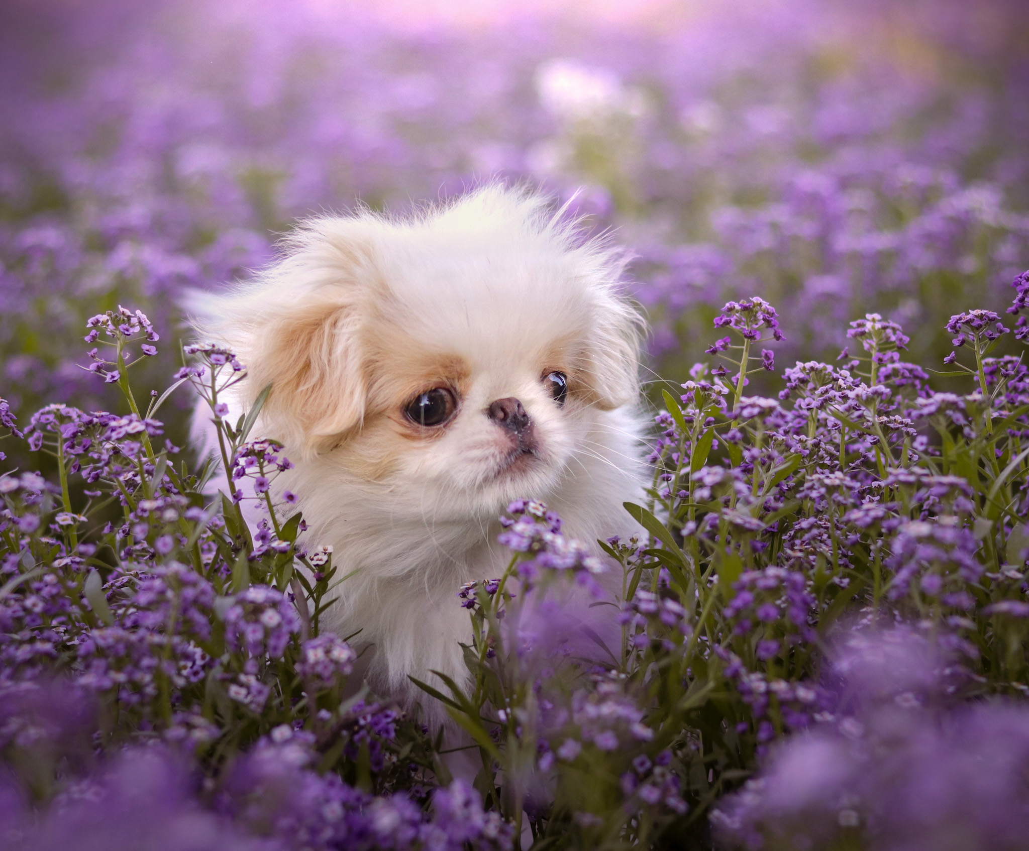 Chiot épagneul Japonais (chin) inscrit au Lof